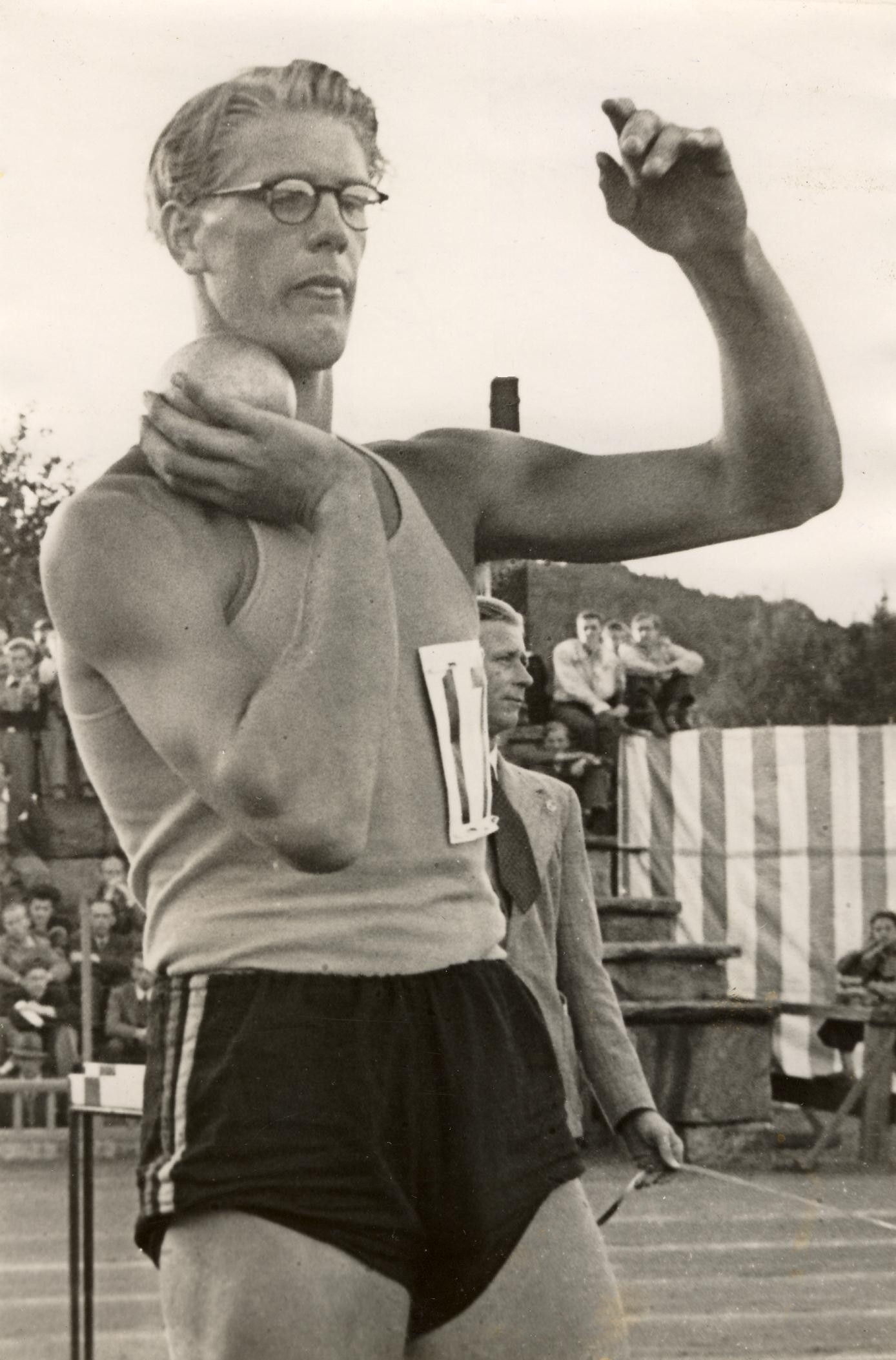 Thage Pettersson-Sönegård 1922-2009